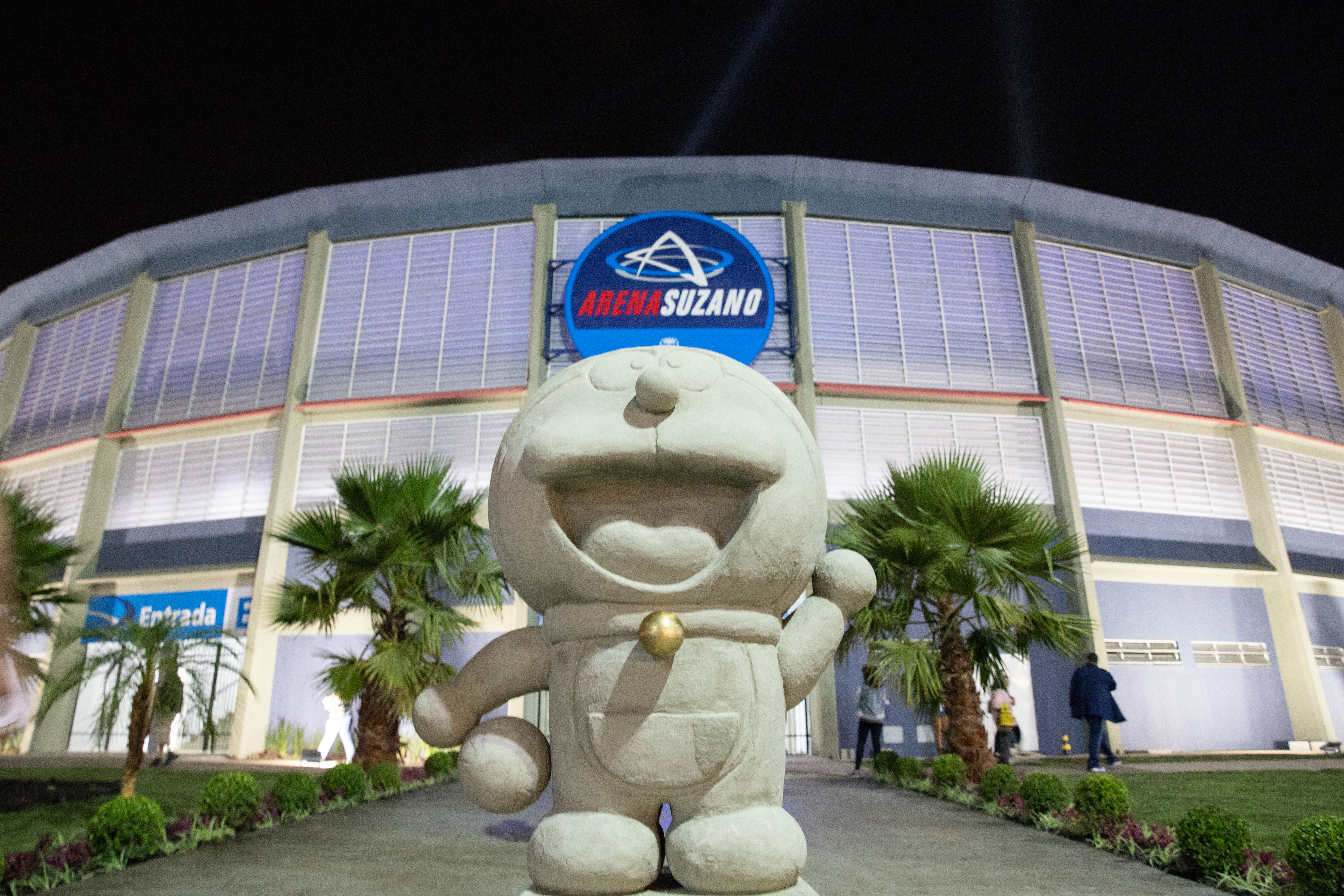 O governador Márcio França, participa da inauguração, nesta quinta-feira, 5 de julho, da Arena Multiuso do Parque Municipal Max Feffer.Local: Suzano/SP Data: 05/07/2018. Foto: Luis Blanco/ Governo do Estado de São Paulo